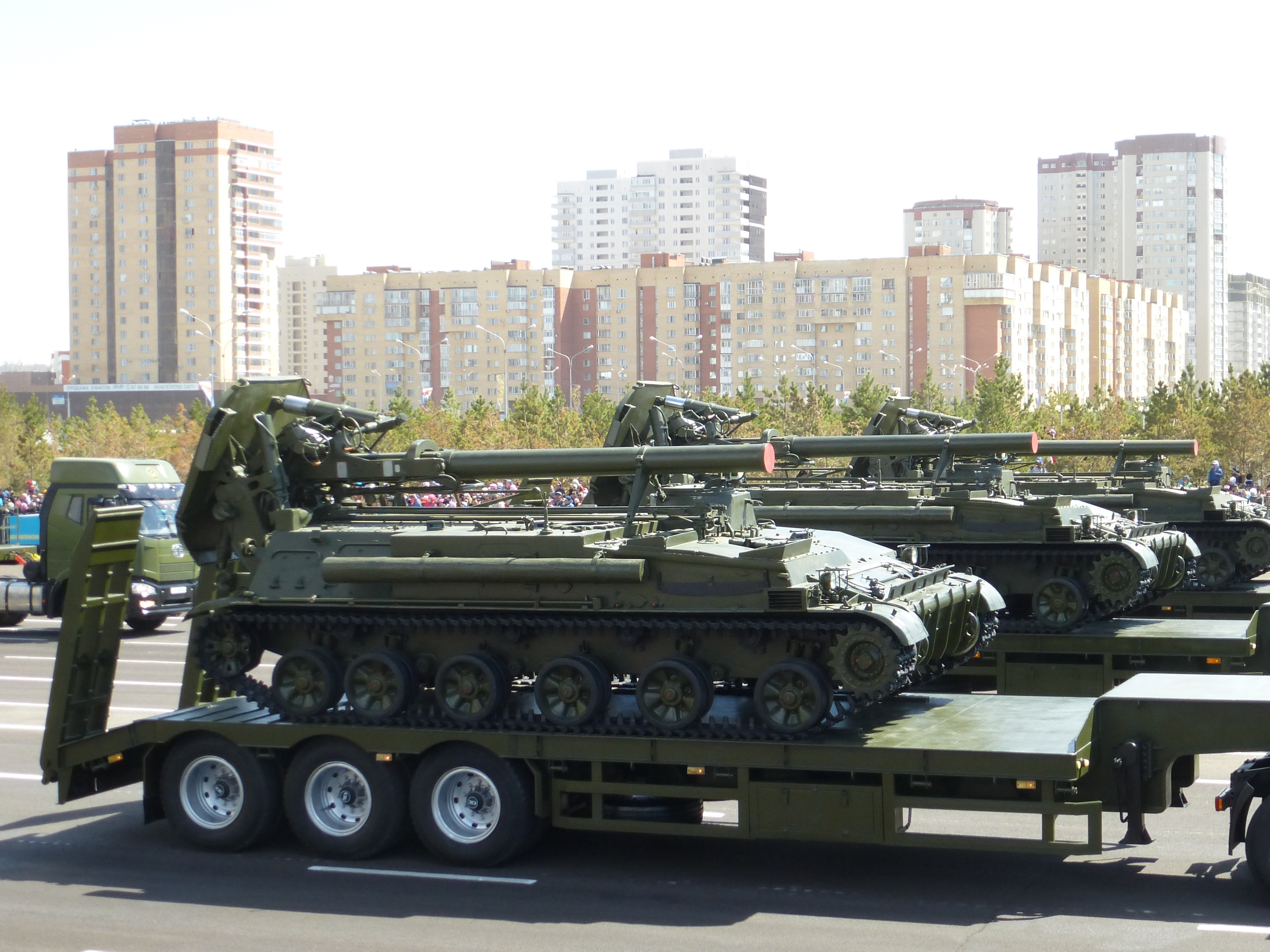 2С4 на военном параде в Астане. 7 мая 2017 года